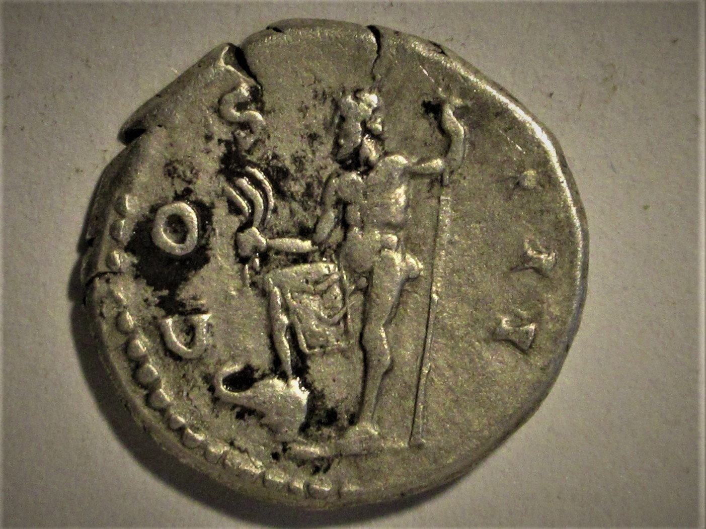 Neptun auf Denar Kaiser Hadrian, Kampmann 32.54.20